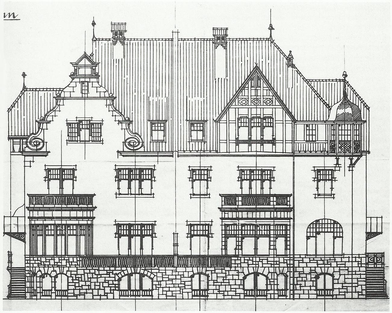 Doppelvilla Lürken/Krämer, Bonn: Entwurf, Aufriss der Rheinfront nach Julius Rolffs